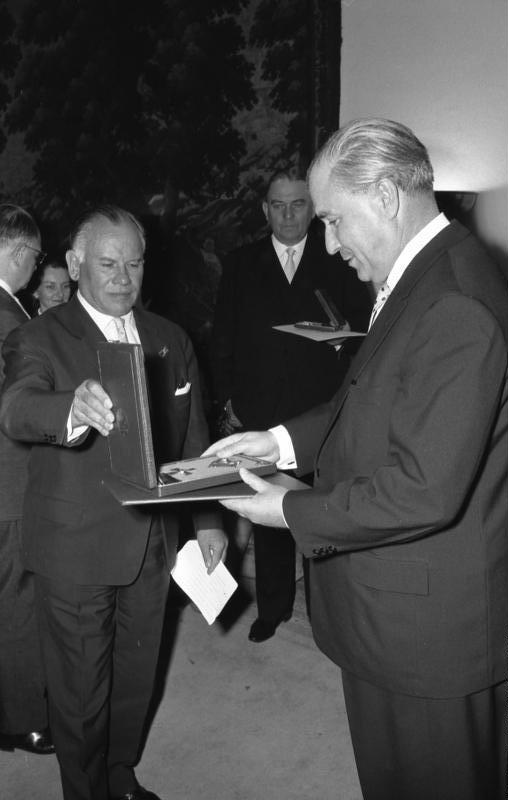 Empfang und Ordensverleihung an Bundestagsabgeordnete durch Bundestagspräsident Dr. Gerstenmaier Bonn (vorne v.l.n.r.: Gerstenmaier, Dr. Kliesing)